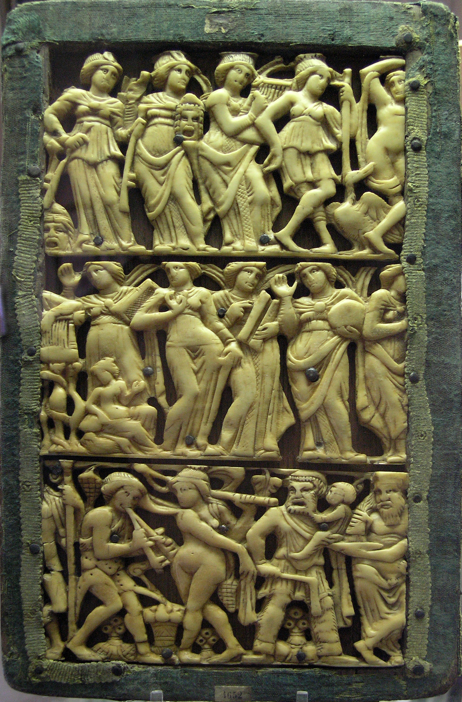 Plat de reliure représentant Apollon musagète et un thyase dionysiaque. Alexandrie, début du VIe s. Ivoire d'éléphant ajouré. (plaque sciée en plusieurs fragments). Ancien trésor de la cathédrale de Saint-Étienne de Bourges.